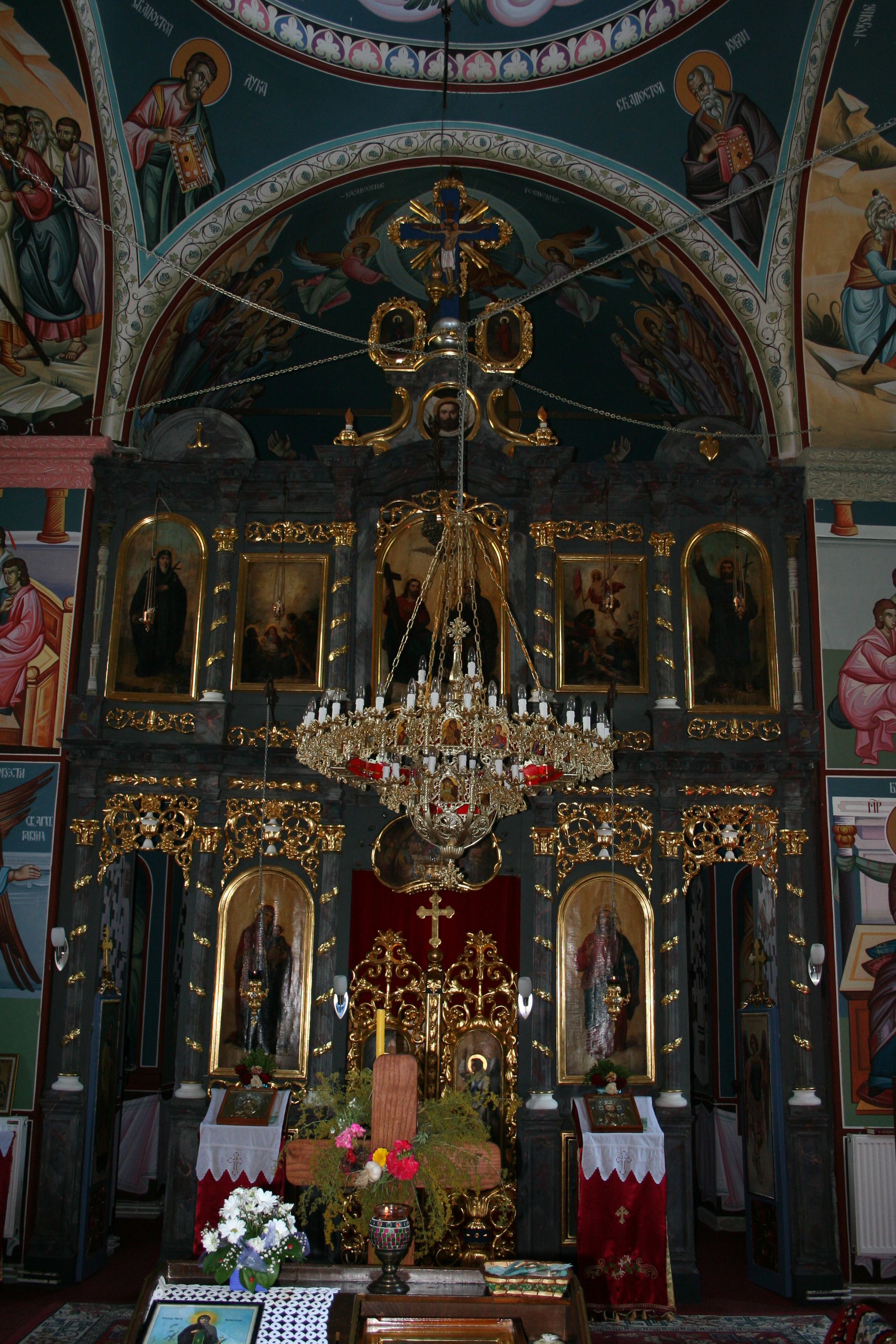 Manastir Petkovica